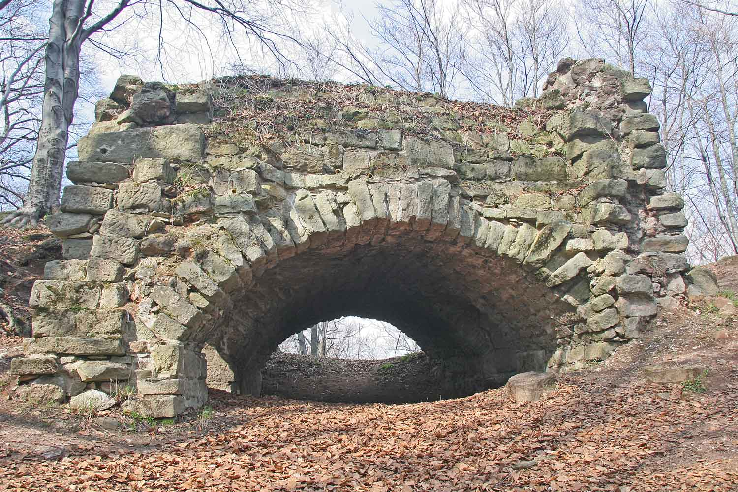 Zřícenina hradu Žampach - Pozůstatky hradního paláce autor:Zp